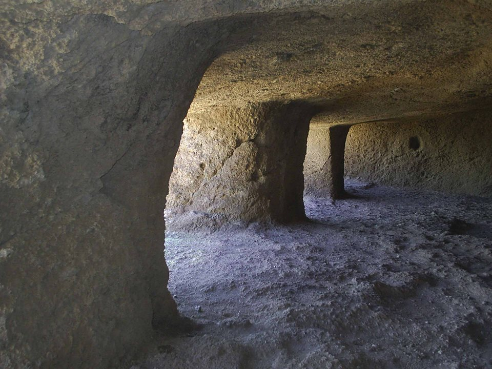 Cavidad de Cuatro Puertas, foto interior